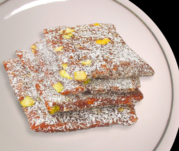 Turkish Cezerye